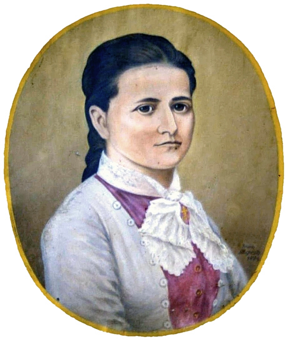 Aennchen Schumacher, Lindenwirtin, Bonn-Bad Godesberg, Portrait an Hauswand ihres Gasthauses in Godesberg